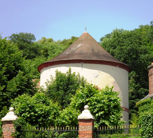 Le colombier de l'ancien château médiéval de Limours (91)